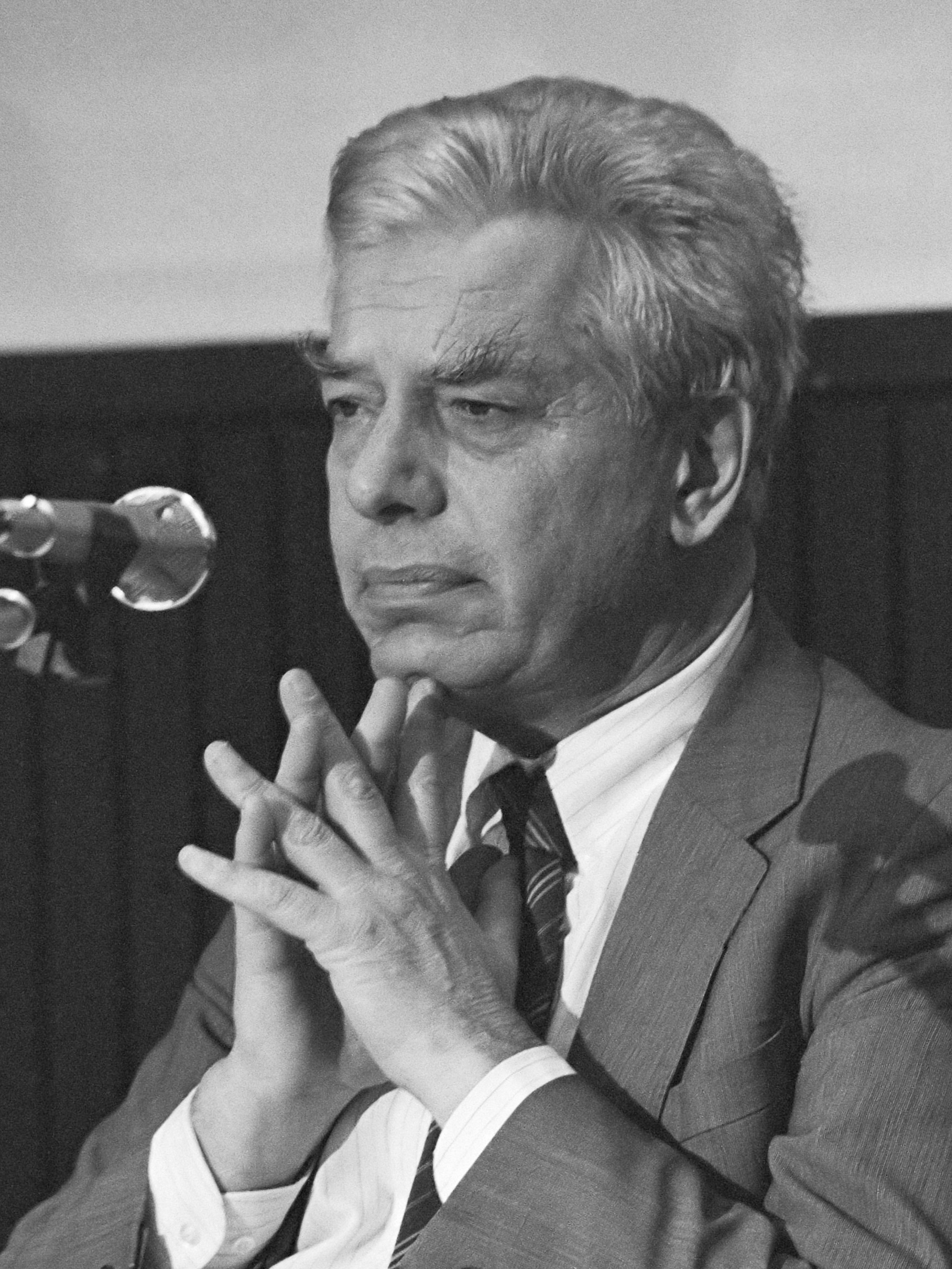 Persconferentie E. de Wilde (dir. Stedelijk Museum ) ivm zijn vertrek en de tentoonstelling La Grande Parade 14 december 1984